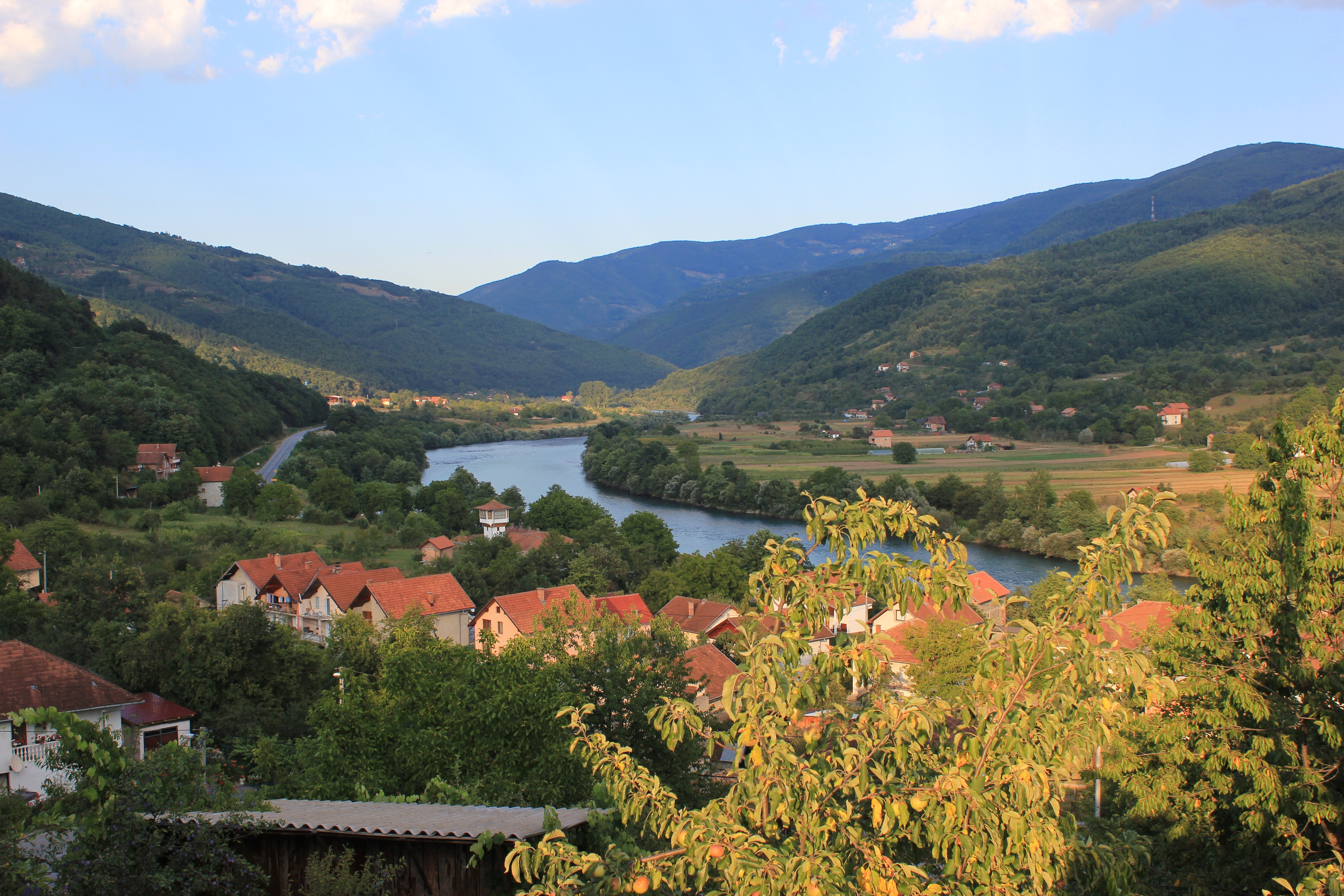 Blick auf Ustikolina und die Drina